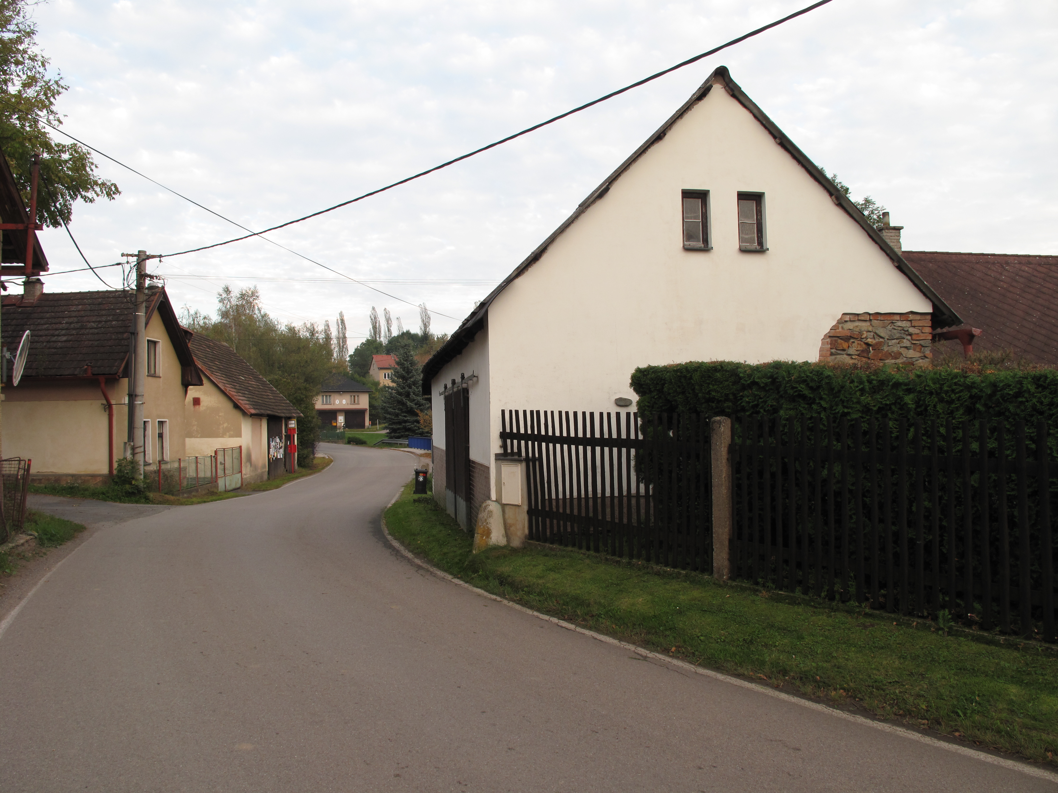 Dům v Pětihostech. Okres Praha-východ, Česká republika.